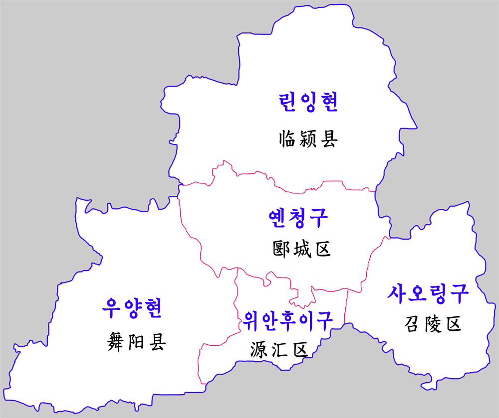 뤄허시 행정구역도